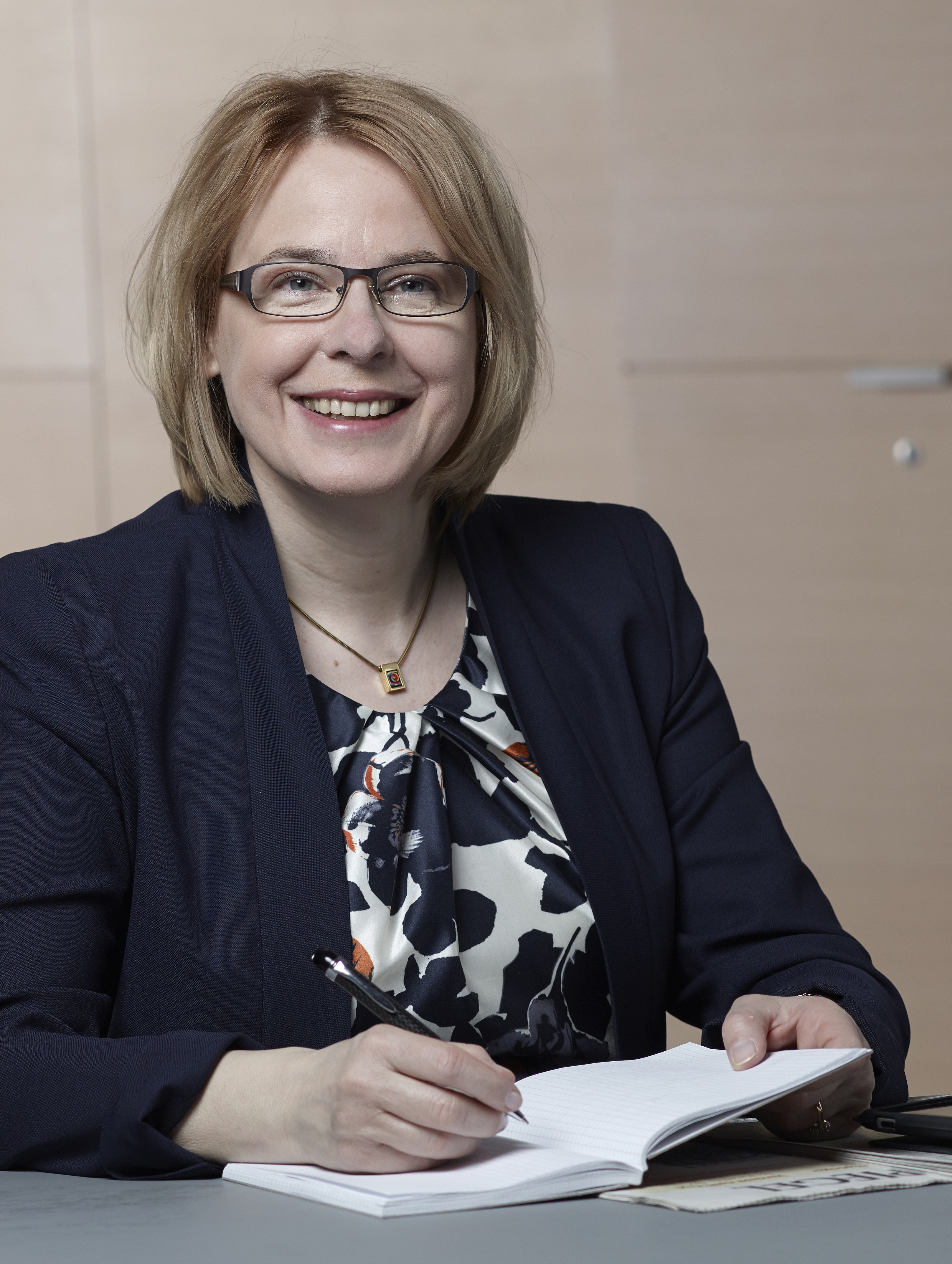 Bettina Kudla, MdB (2013)